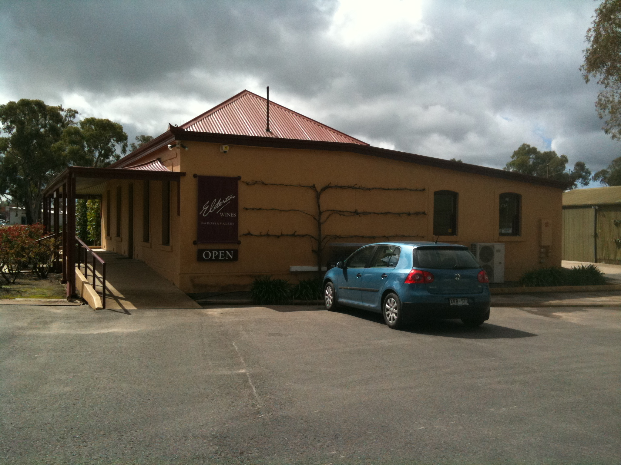 Elderton Wines cellar door